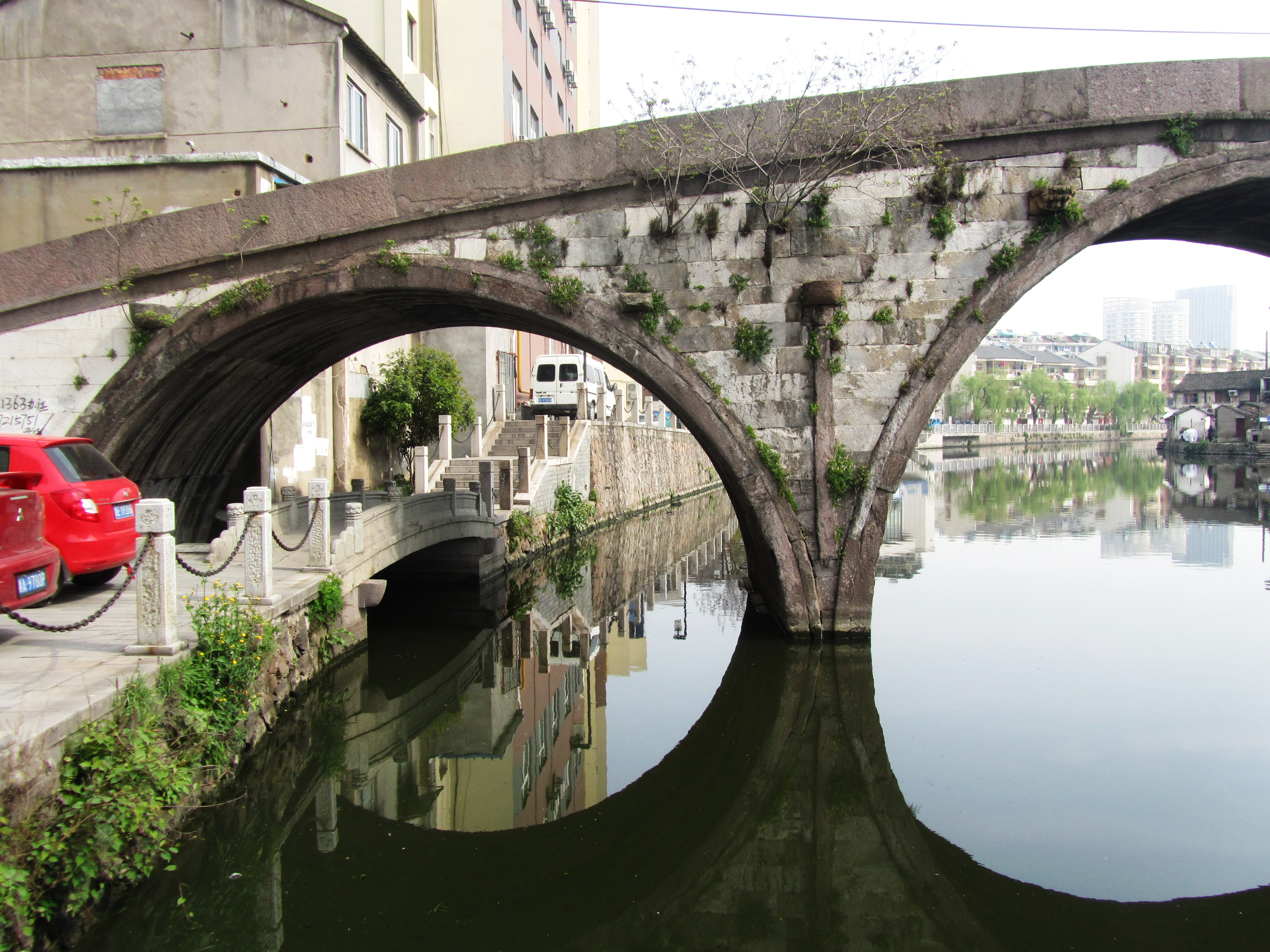 潮音桥，自南侧看桥下桥。